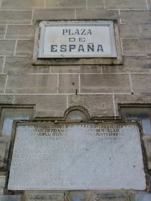 Placas de la Plaza España en El Puerto de Santa María, España.